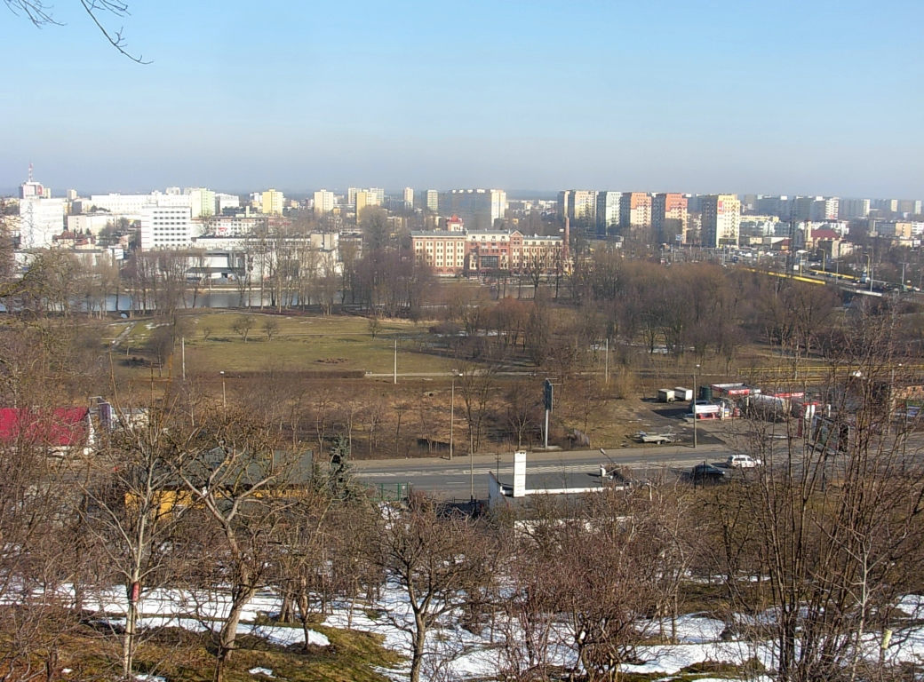 Ulica Toruńska i park Centralny w Bydgoszczy